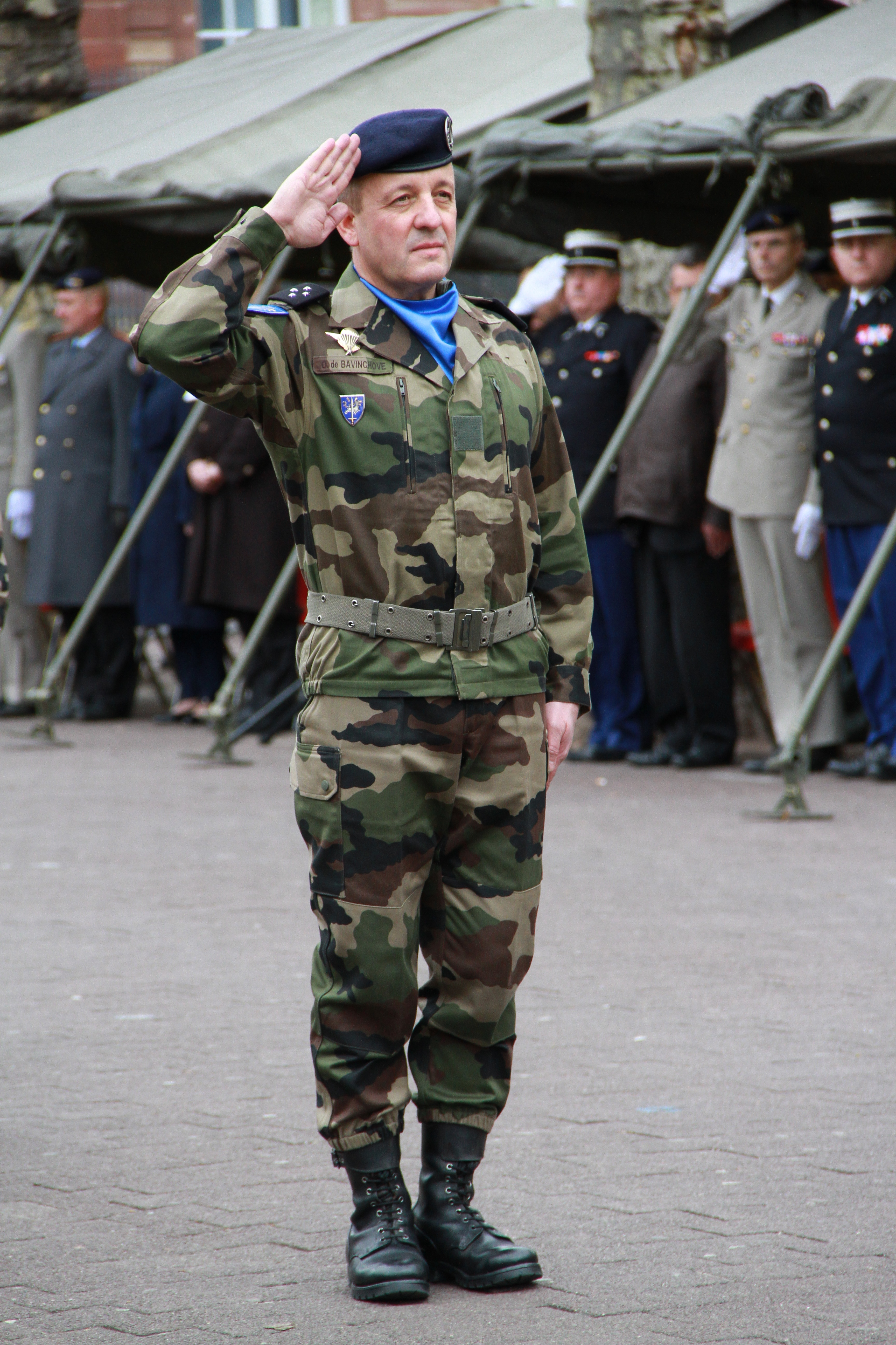 Le général de corps d’armée Olivier de Bavinchove commandant de l’Eurocorps lors de la prise d’armes de fin de mission de l’Eurocorps en Afghanistan, place Broglie à Strasbourg 31 janvier 201, en présence de M. Pieter De Crem, ministre belge de la Défense, et de M. Kader Arif, ministre délégué auprès du ministre de la Défense, chargé des Anciens Combattants.